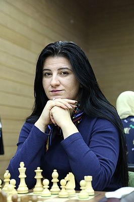 Зейнаб Мамедъярова, фото Этери Кублашвили с командного чемпионата мира в Ханты-Мансийске